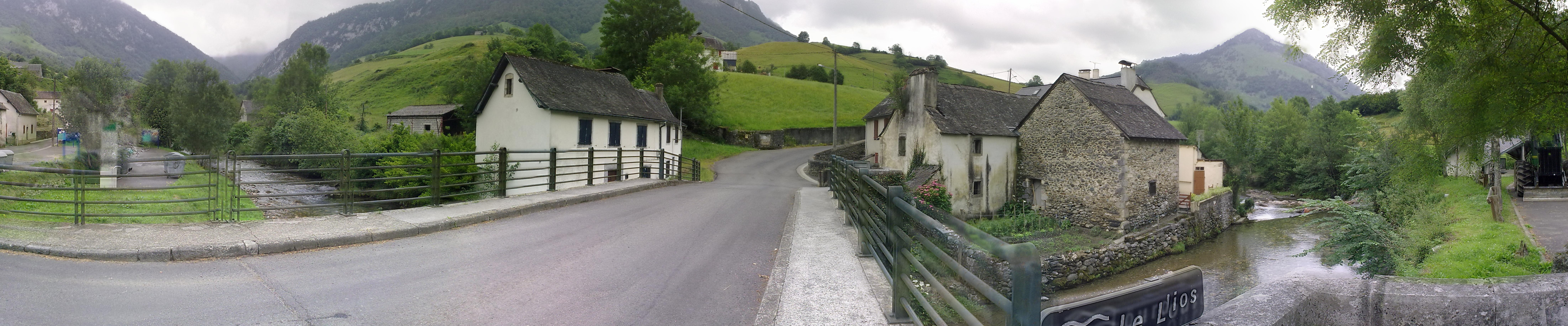 Panorama du Gave de Lourdios à Lourdios-Ichère le 4 juillet 2010.